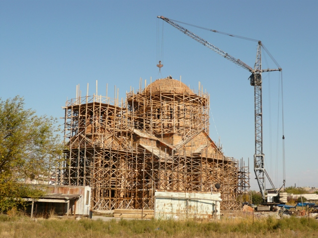 L'église Saint-Hovannès en construction